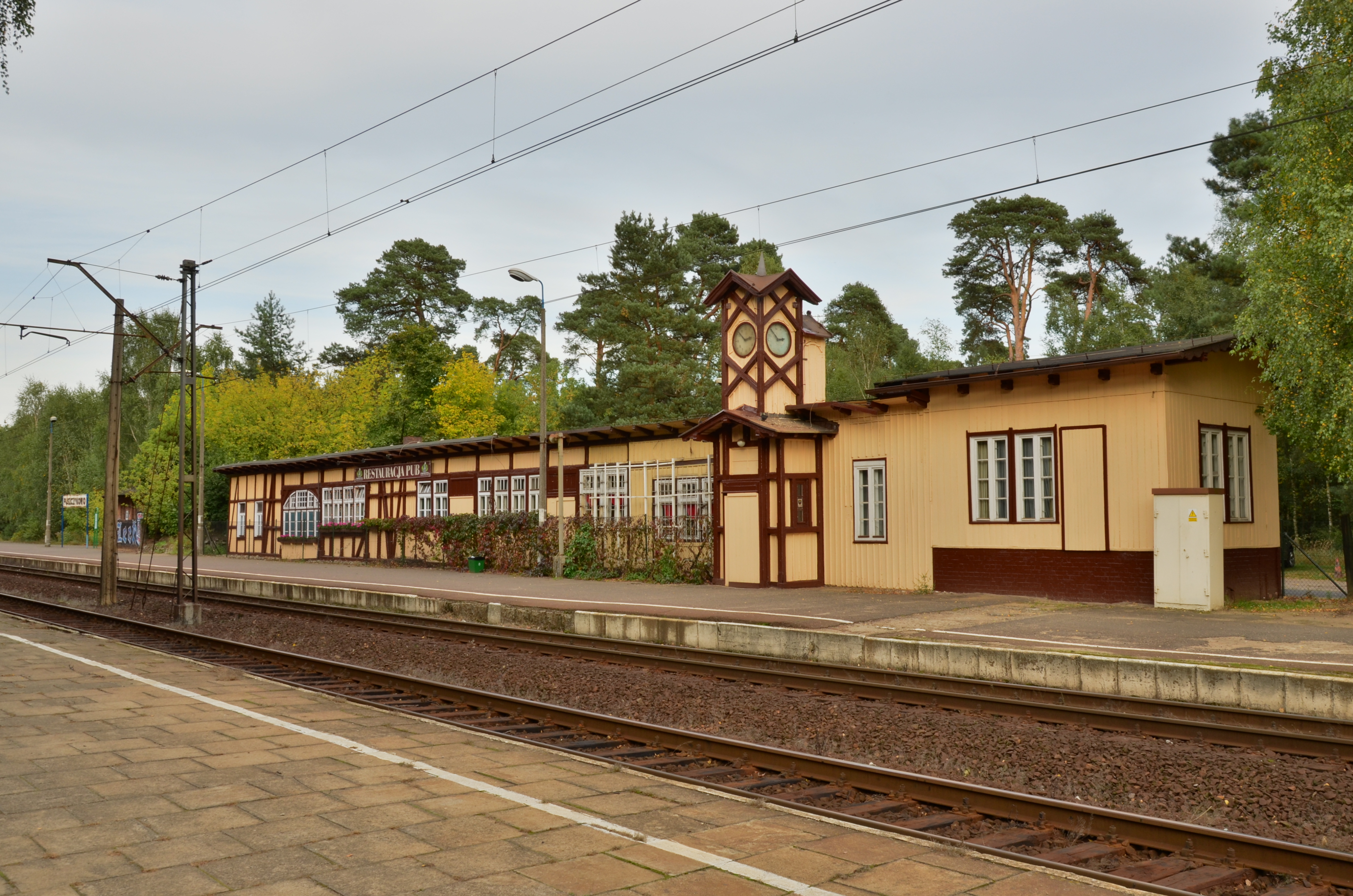 drewniany dworzec kolejowy z początku XX w. Puszczykowo, Puszczykowo